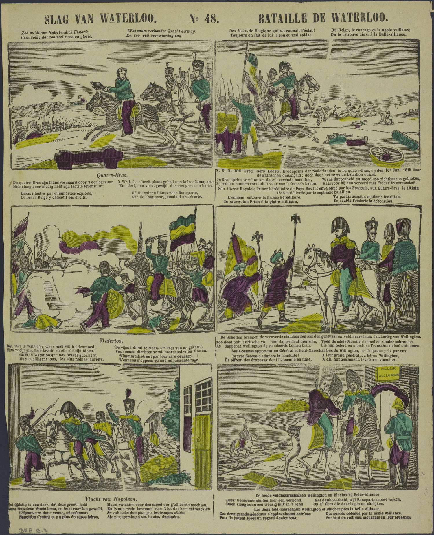 Centsprent met 3 x 2 omkaderde langwerpige houtsneden, met gedetailleerde afbeeldingen van scènes op het slagveld bij Quatre Bras in 1815. Genoemd worden de Kroonprins der Nederlanden Willem Frederik George Lodewijk (Koning Willem II) en de hertog van Wellington. Napoleon vlucht, en de veldmaarschalken Wellington en Blucher sluiten een verbond. Ze kijken treurig naar het slagveld met lijken. Bevat twee of drieregelige rijmende onderschriften in Nederlands en Frans.